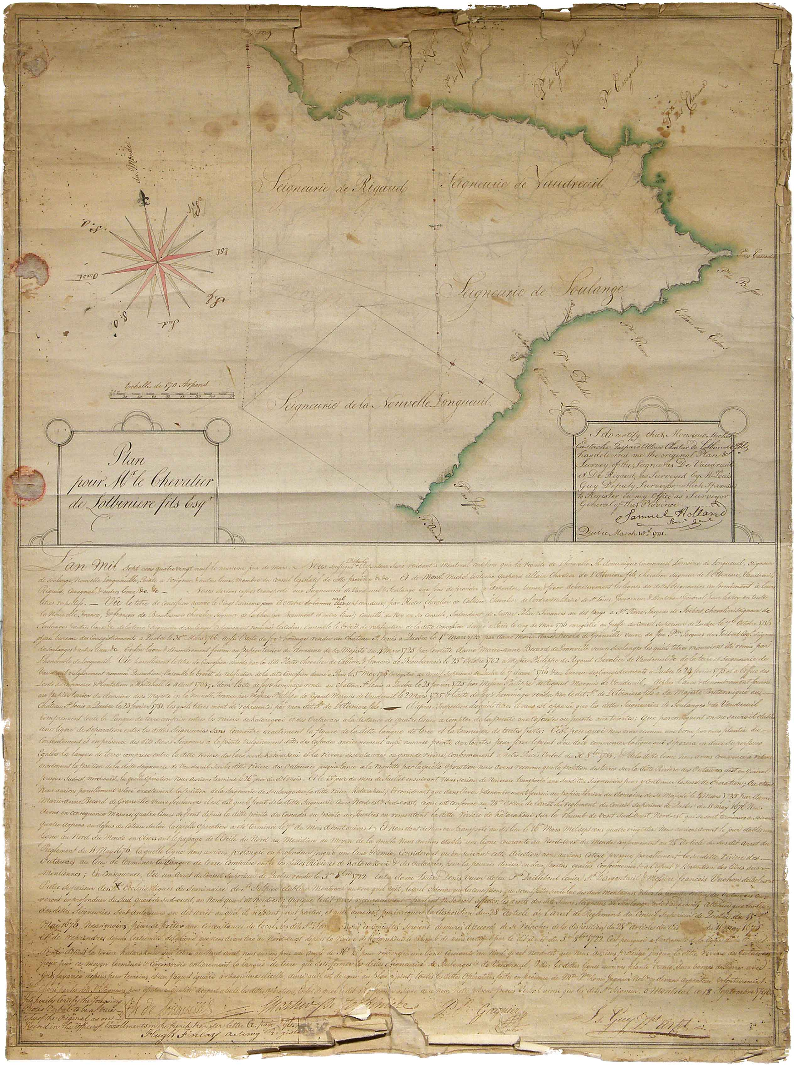 Carte de la région de Vaudreuil-Soulanges dessinée à la suite d'une requête des seigneurs Joseph-Dominique-Emmanuel Le Moyne de Longueuil et Michel-Eustache-Gaspard-Alain Chartier de Lotbinière pour fixer la frontière médiane entre les seigneuries de Soulanges et de Vaudreuil. Sous la carte est inscrit le procès-verbal du 18 septembre 1790 concernant les opérations d'arpentage réalisées par le notaire et arpenteur Pierre-Rémi Gagnier ayant mené à l’établissement de cette frontière. Le document est signé par l'arpenteur et par les seigneurs ayant initié la requête. Les frontières des seigneuries de Rigaud et de Nouvelle-Longueuil sont aussi dessinées et on remarque également la délimitation du territoire qui deviendra le canton de Newton en 1805. Le procès-verbal au bas de la carte est authentifié par Hugh Finlay et Louis Guy, arpenteurs, et certifié par Samuel Holland, arpenteur général de la province de Québec.